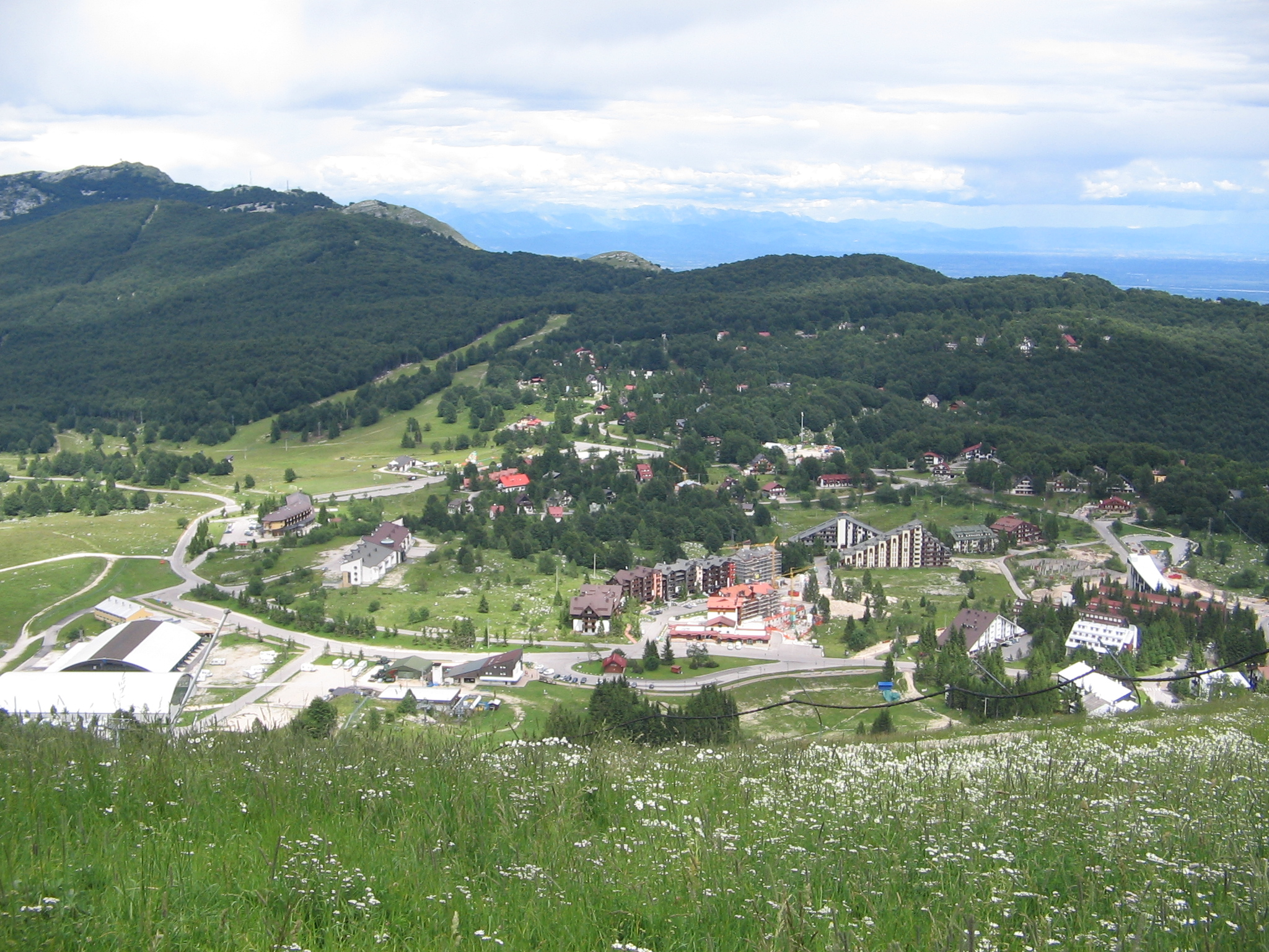 Piancavallo in estate.